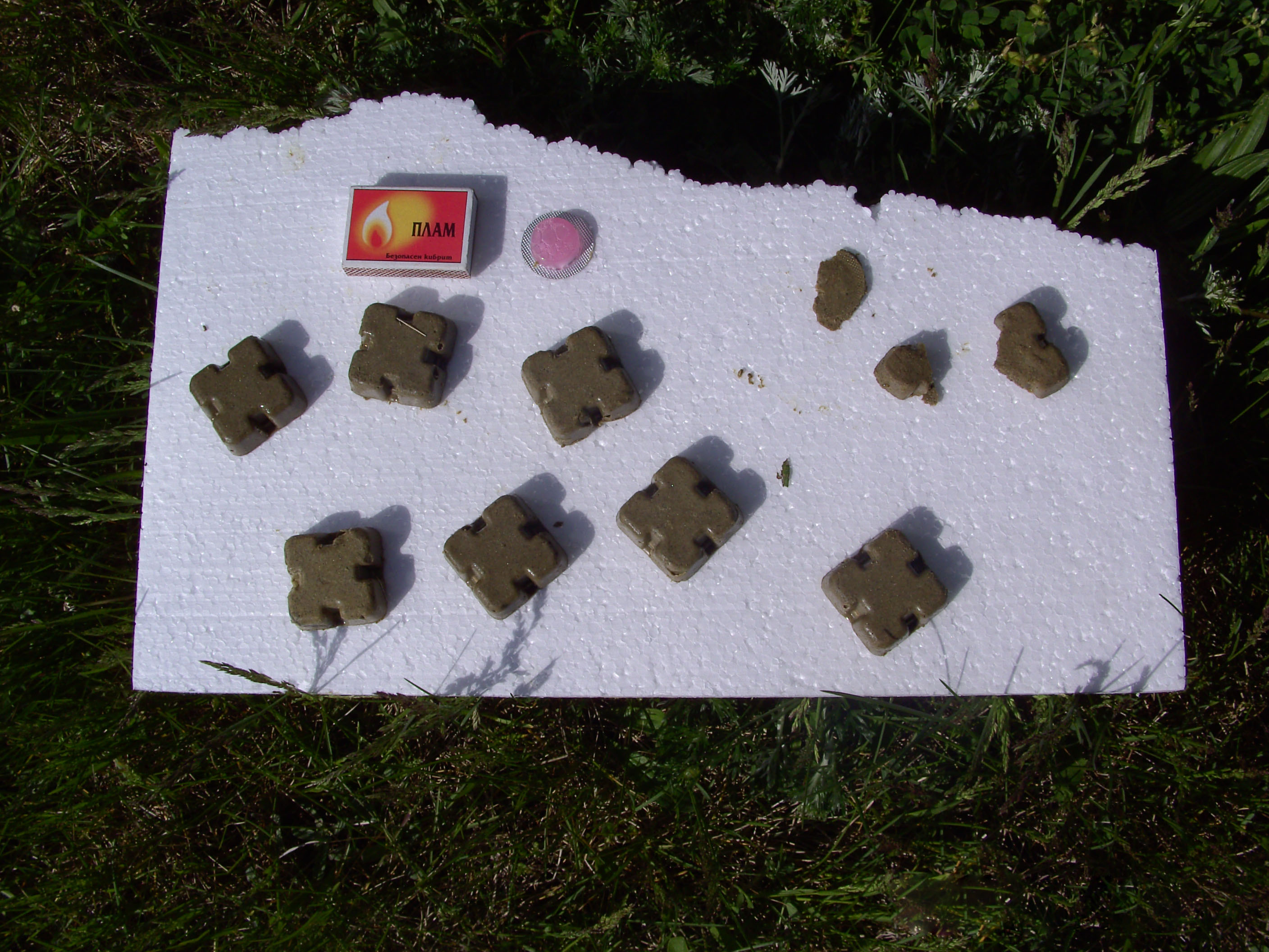 Ваксина за орална ваксинация при лисиците